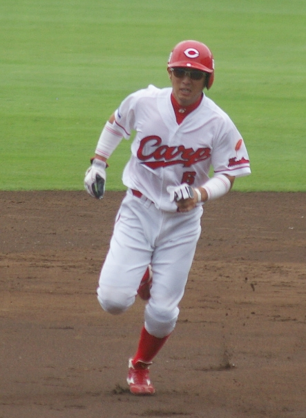 広島東洋カープ梵英心